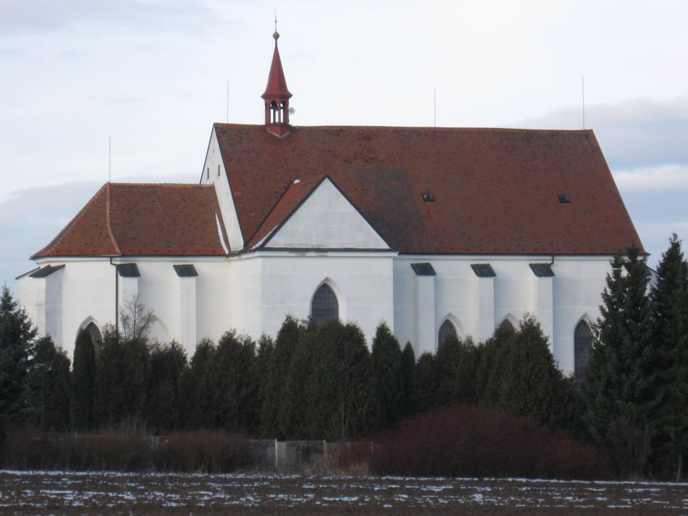 Kostel v Lipovci